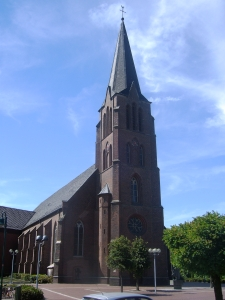 Pfarrkirche St. Peter und Paul Garrel